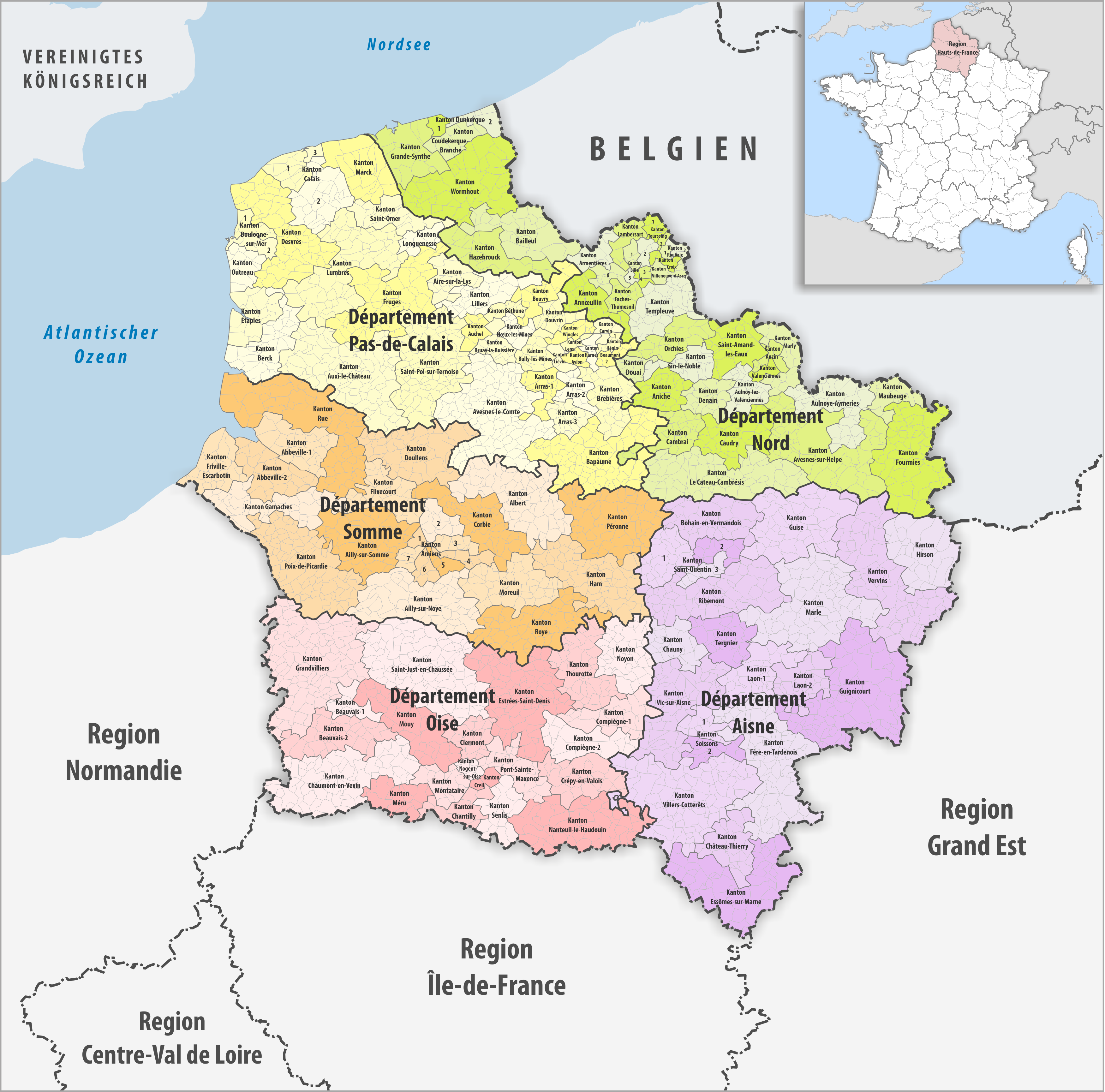 Gemeinden, Kantone und Departemente in der Region Hauts-de-France